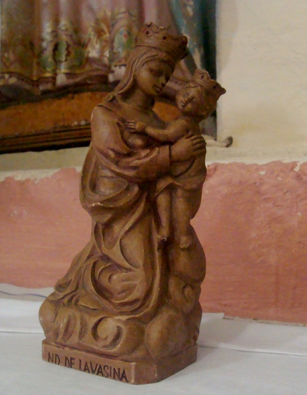 Statue en l'honneur de Notre-Dame de Lavasina, plâtre teint au brou de noix, intérieur de l'église paroissiale d'Isolaccio-di-Fiumorbo.